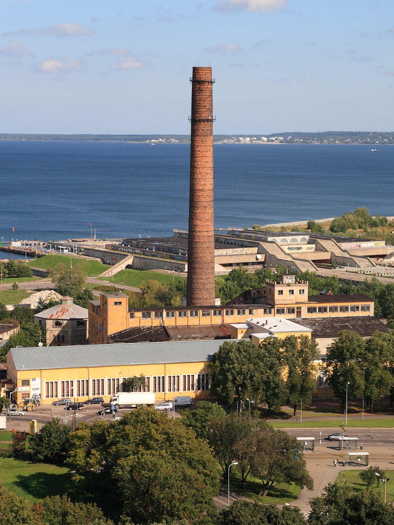 Tallinna Elektrijaama korsten